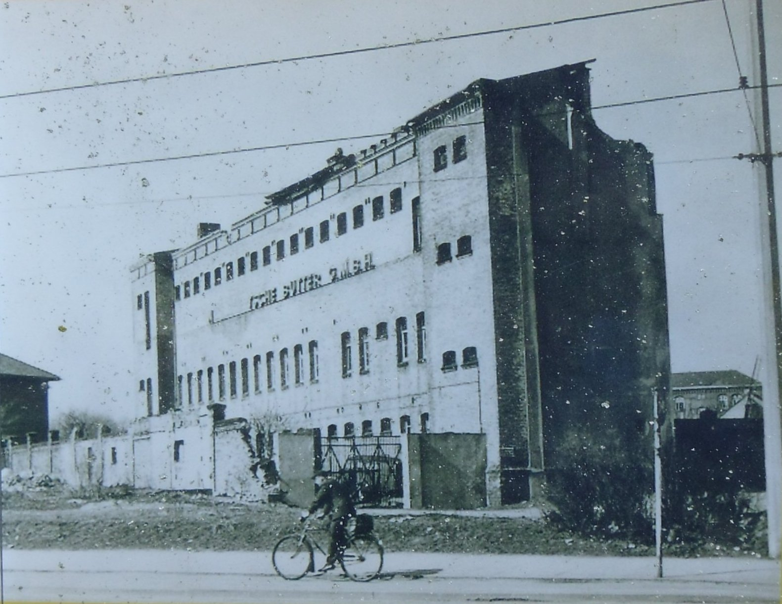 Ehemalige Arrestanstalt der Marine an der Feldstraße in Kiel (Foto an einer öffentlich aufgestellten Stele in Kiel)